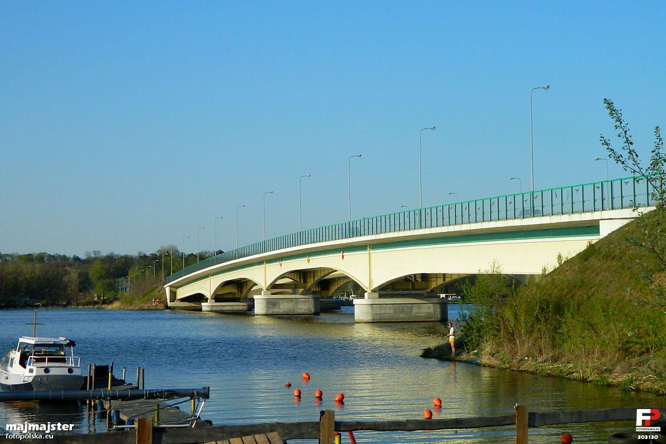 Most w Zegrzu strona zachodnia od Zegrza Południowego